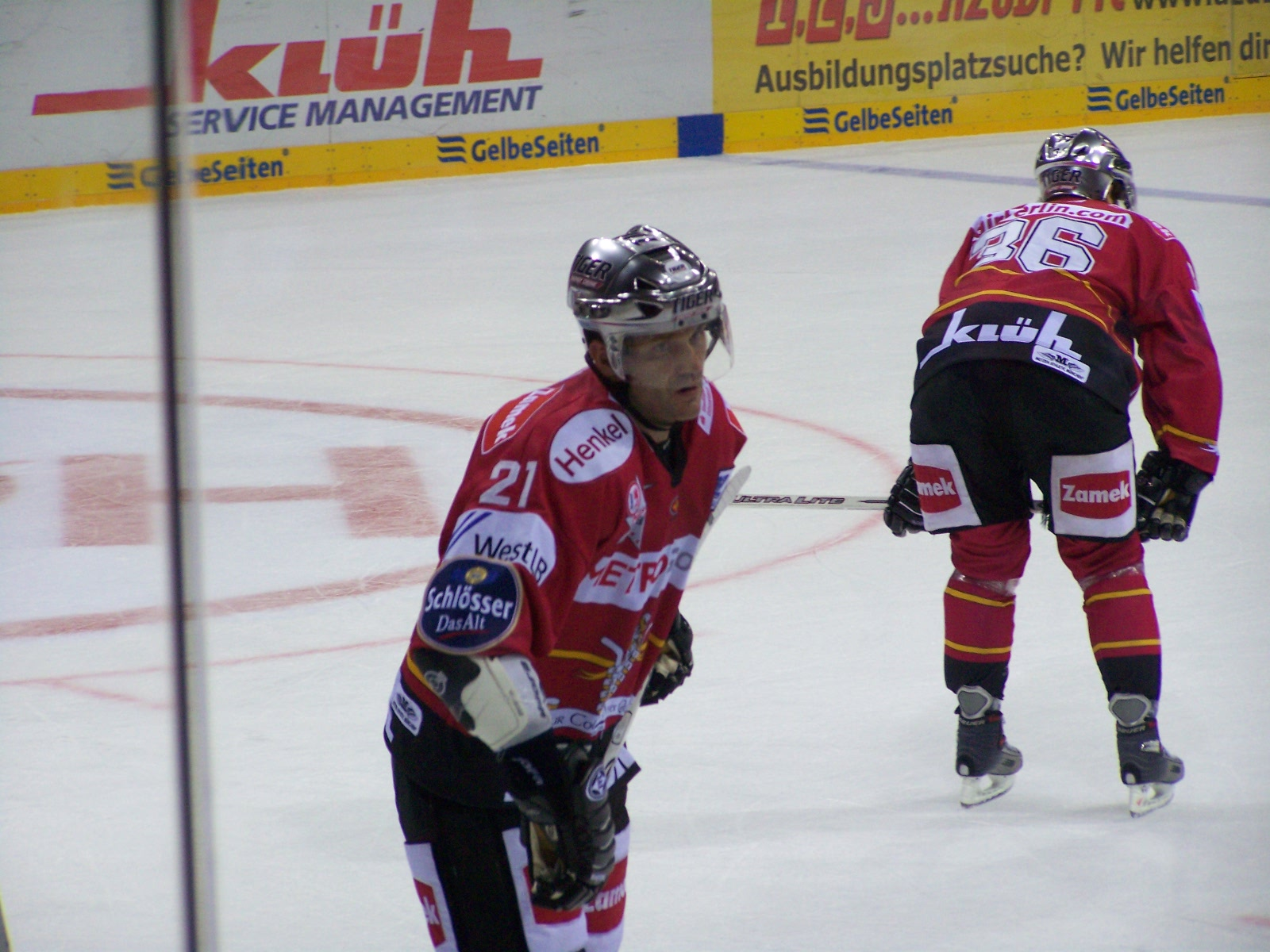 Darren van Impe